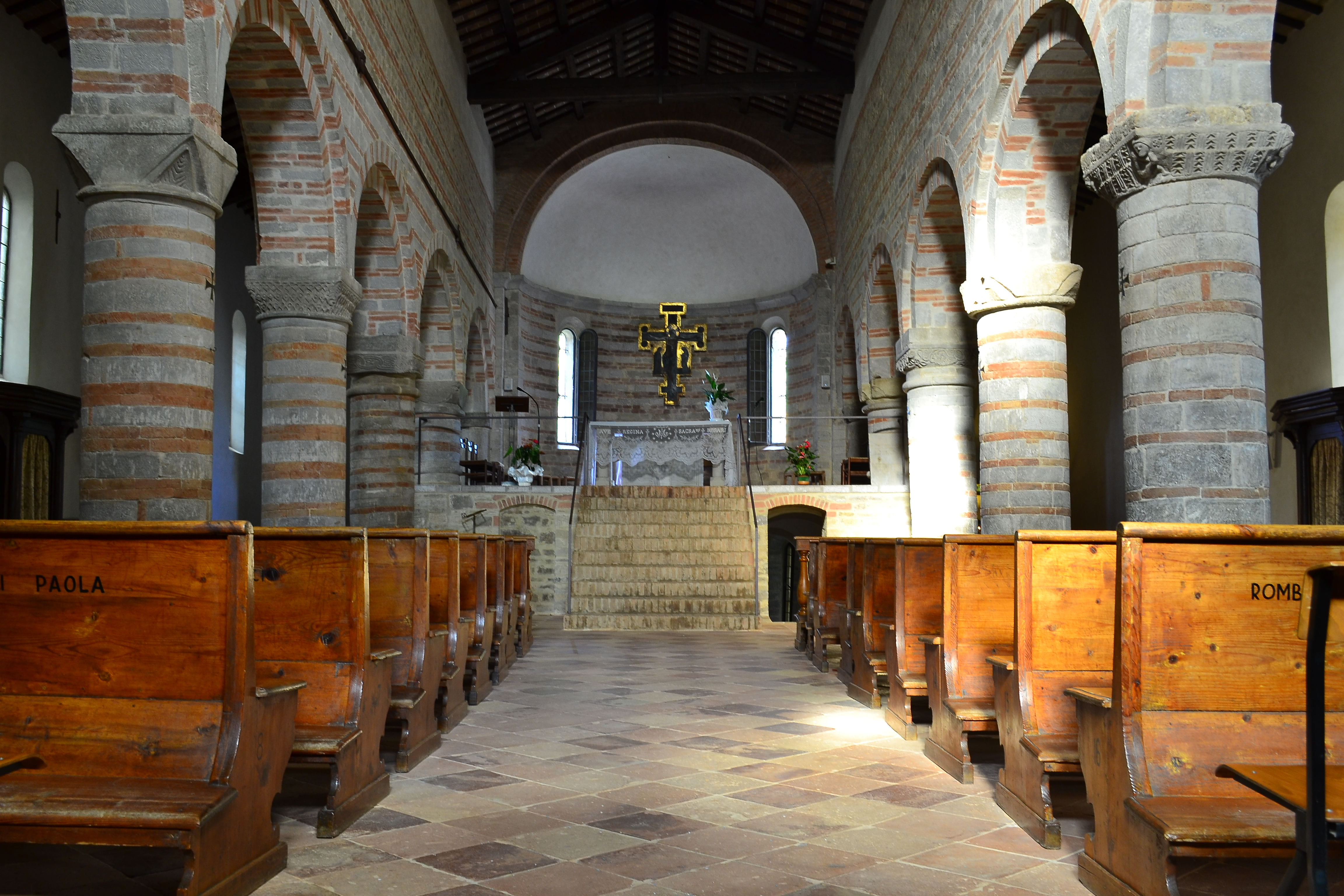 Pieve da Polenta This is a photo of a monument which is part of cultural heritage of Italy.